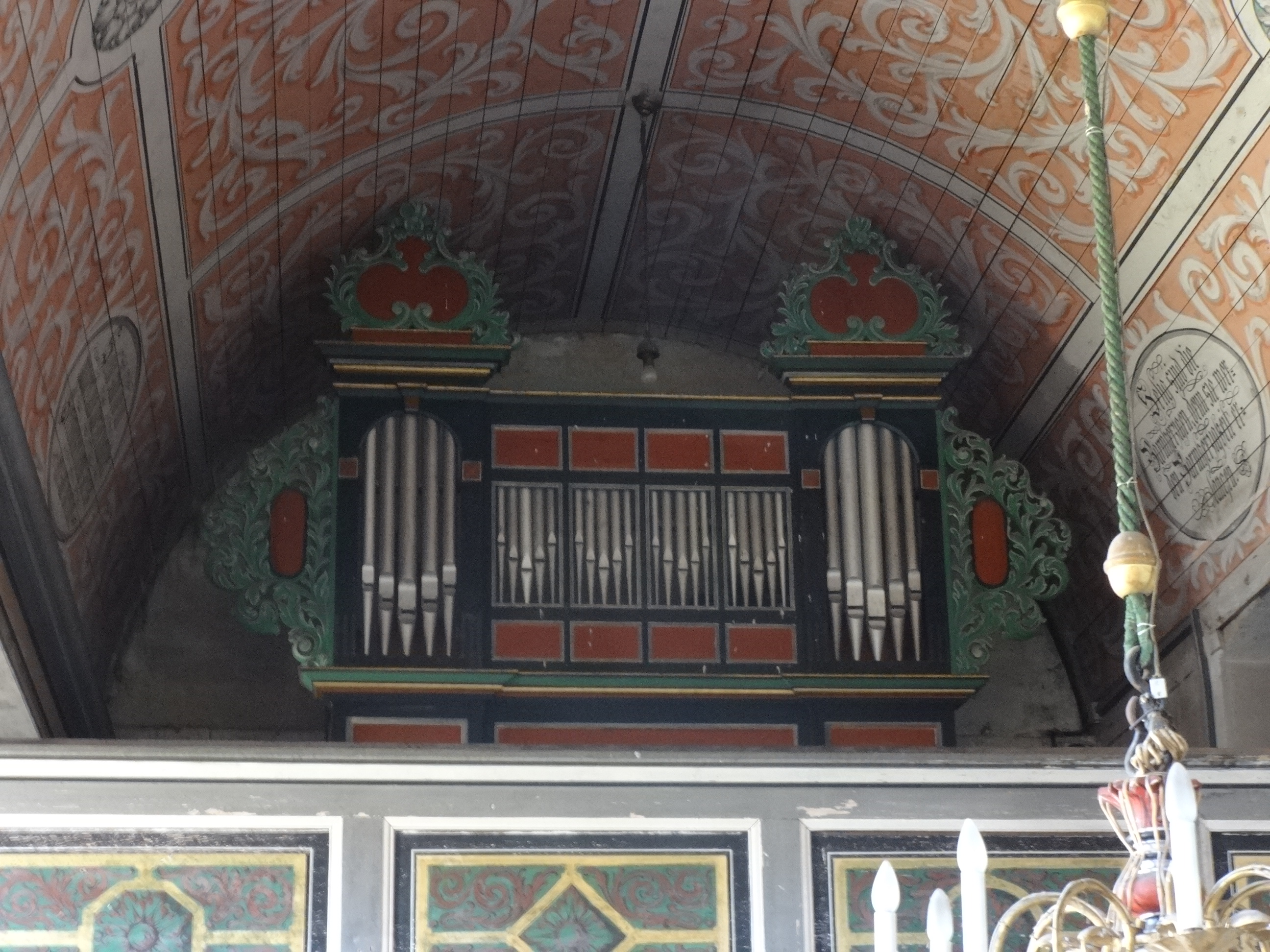 Die Dorfkirche in Niendorf, Gemeinde Ihlow (Fläming) wurde im 18. Jahrhundert auf dem Sockel eines Vorgängerbaus errichtet. 1908 wurde sie von der Kirchengemeinde neobarock überformt. Im Innern befinden sich unter anderem ein Altar sowie eine Kanzel aus dem 18. Jahrhundert.